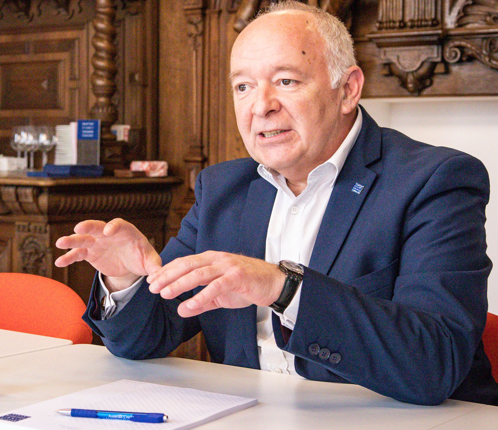 Peter Androsch, geschäftsführender Gesellschafter des Kreditversicherungsmaklers A.C.I.C. im Interview